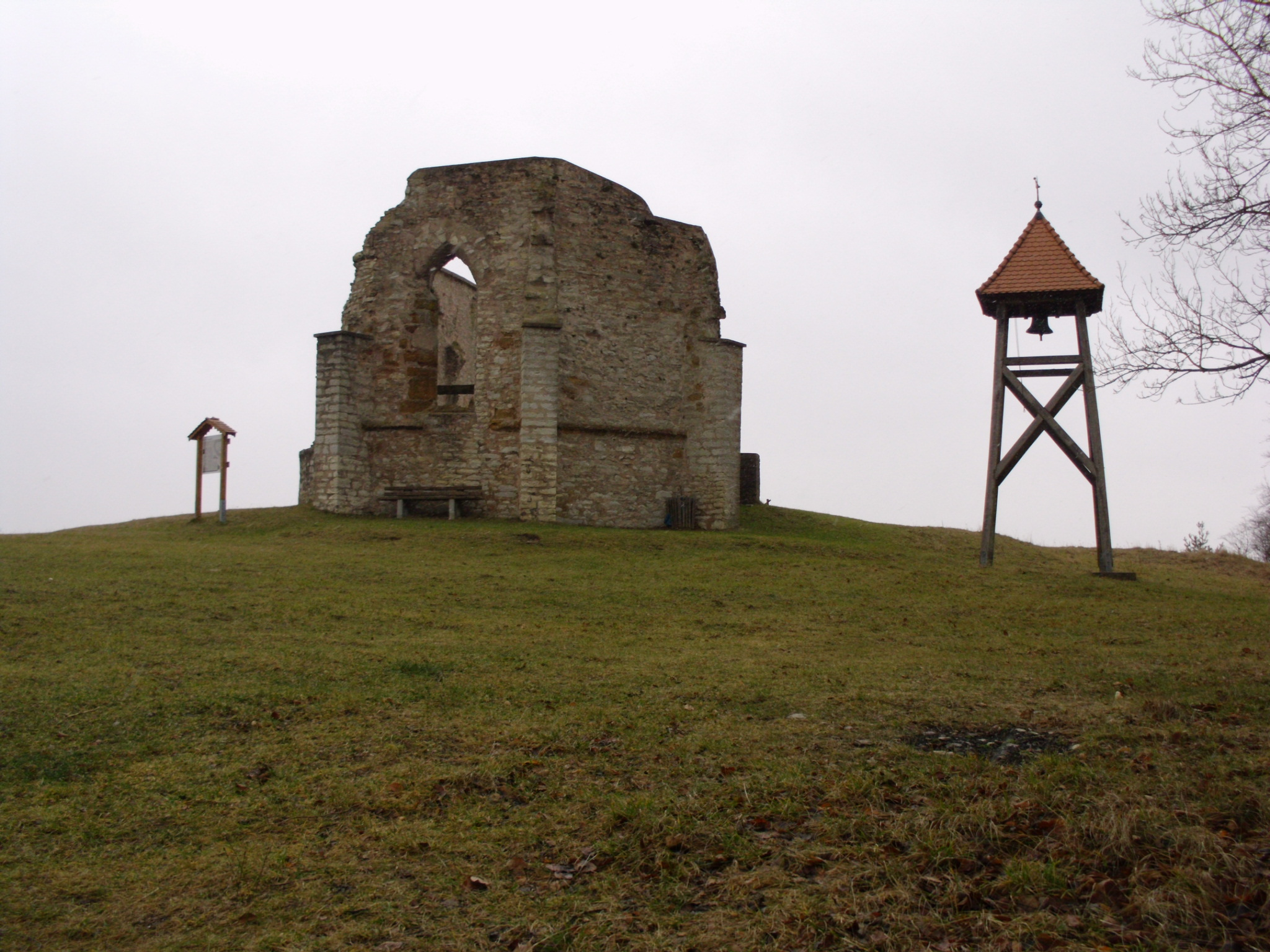 Hechlingen am See, Landkreis Weißenburg-Gunzenhausen (Bayern), Ruine der Katharinenkapelle auf dem Kappellbuck